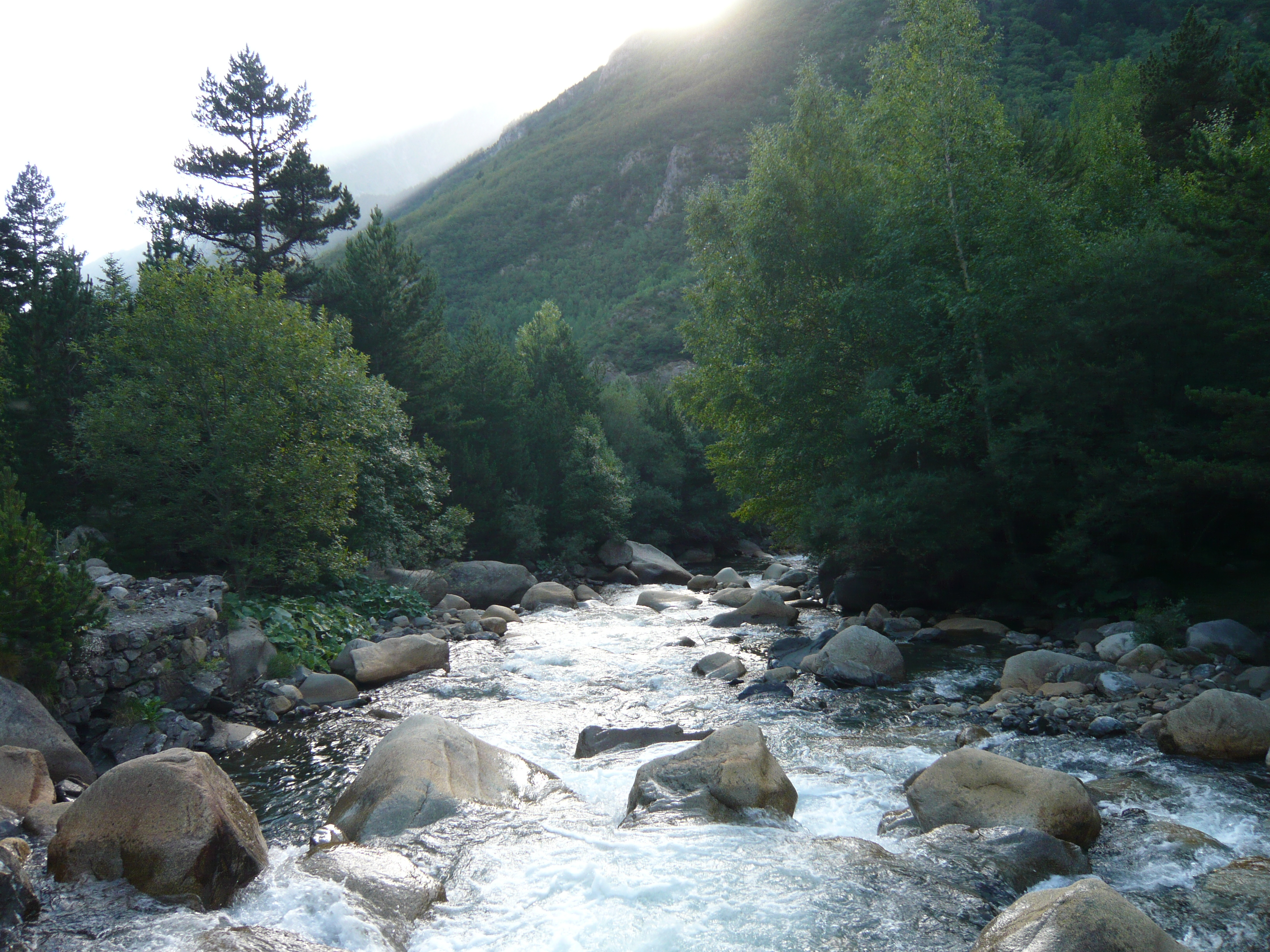 Pont camí de la Font